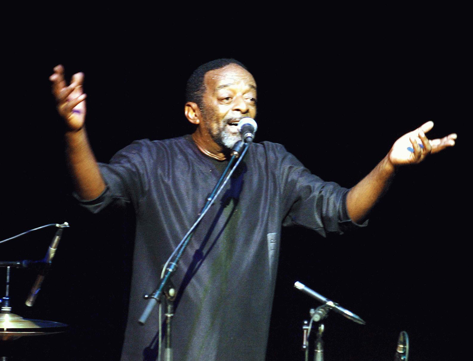 O cantor brasileiro Naná Vasconcelos.